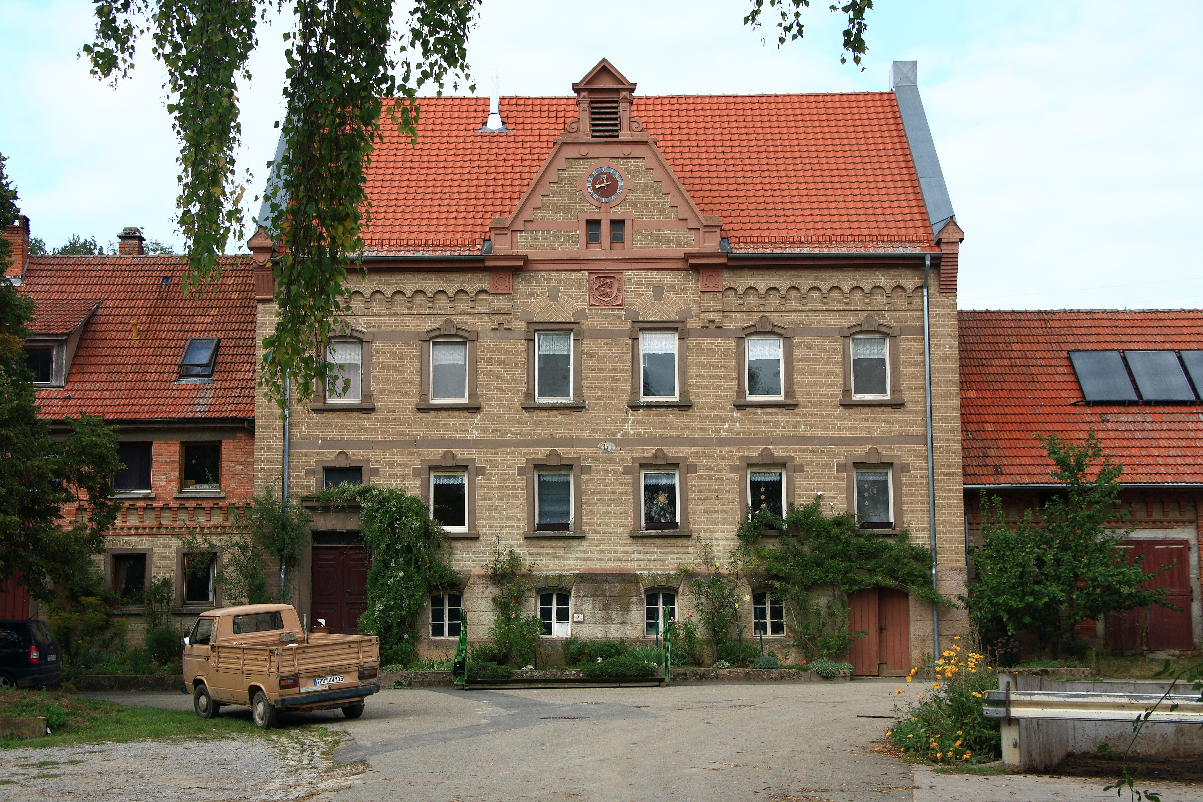 Louisgarde ist ein ehem. Kloster und spätere hohenlohische Domäne. Massives Herrenhaus mit Zwerchgiebel und Uhr. Der Wapenstein ist von 1902 bez.